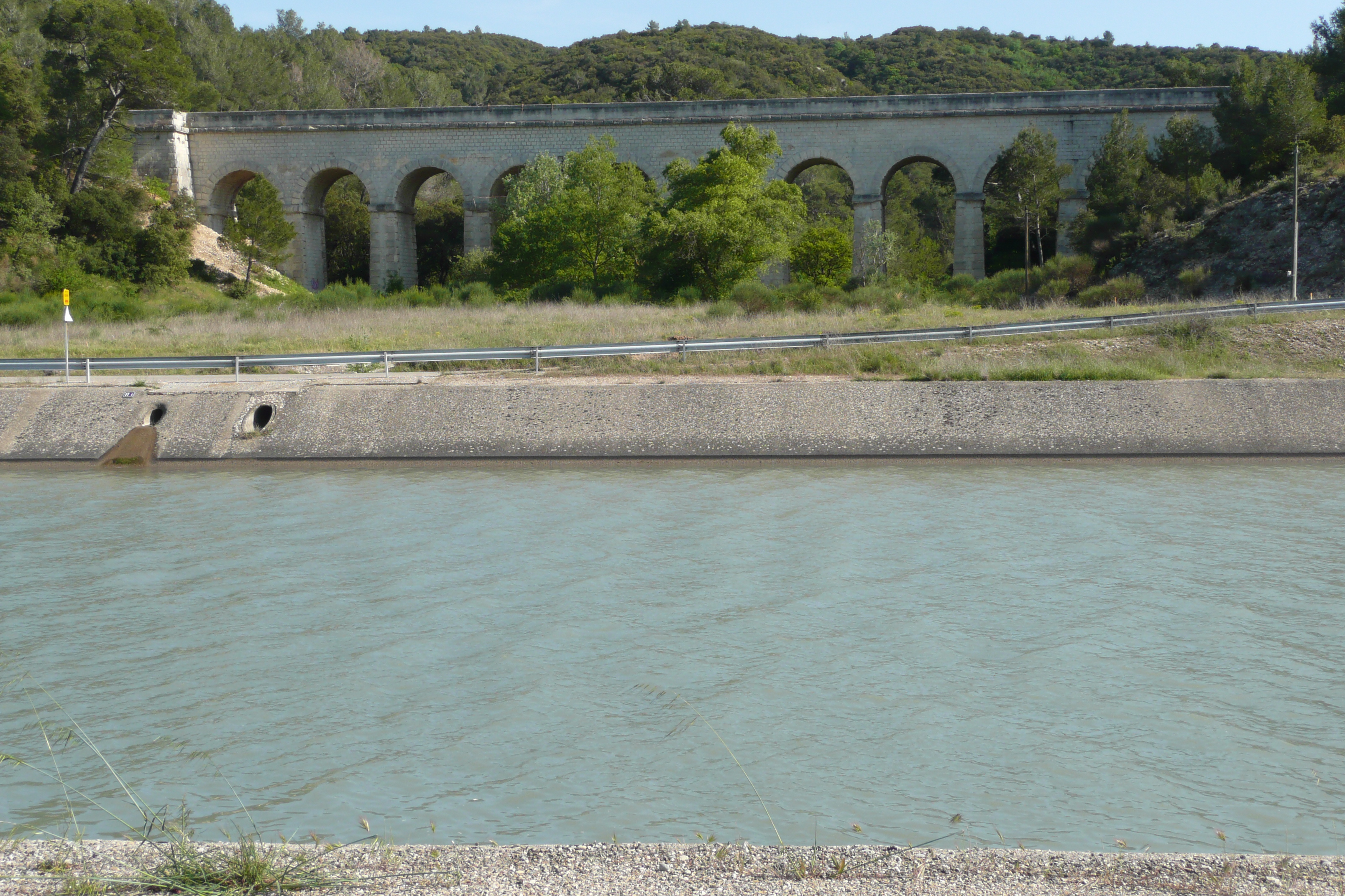 Pont-aqueduc du canal de Marseille près de Charleval (probablement Valbonnette). Au premier plan, le canal EDF.